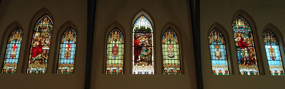 Clerestório no interior da Catedral Anglicana da Santíssima Trindade, Porto Alegre, Brasil.